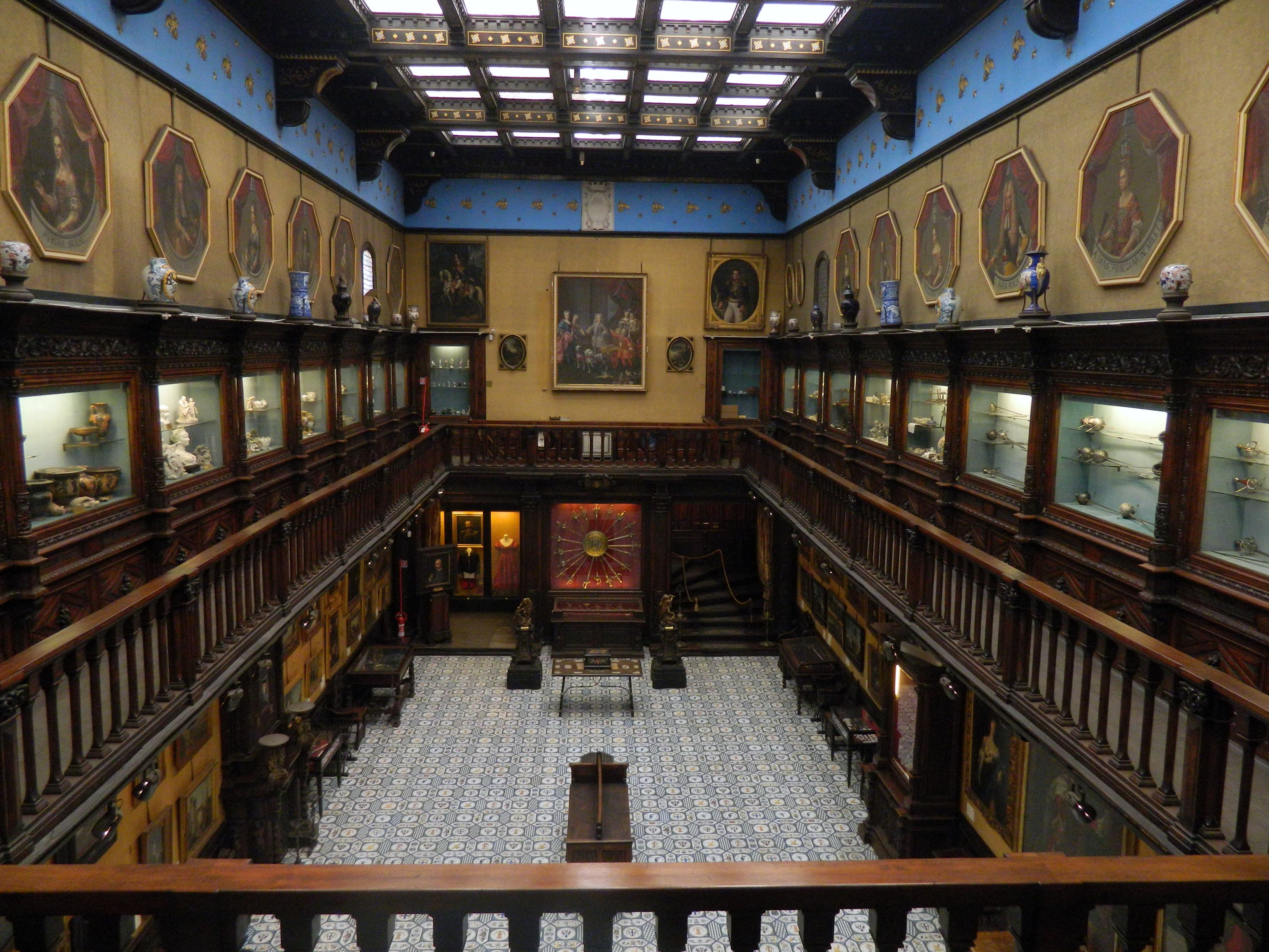 Museo Civico Gaetano Filangieri (Palazzo Como), Napoli.